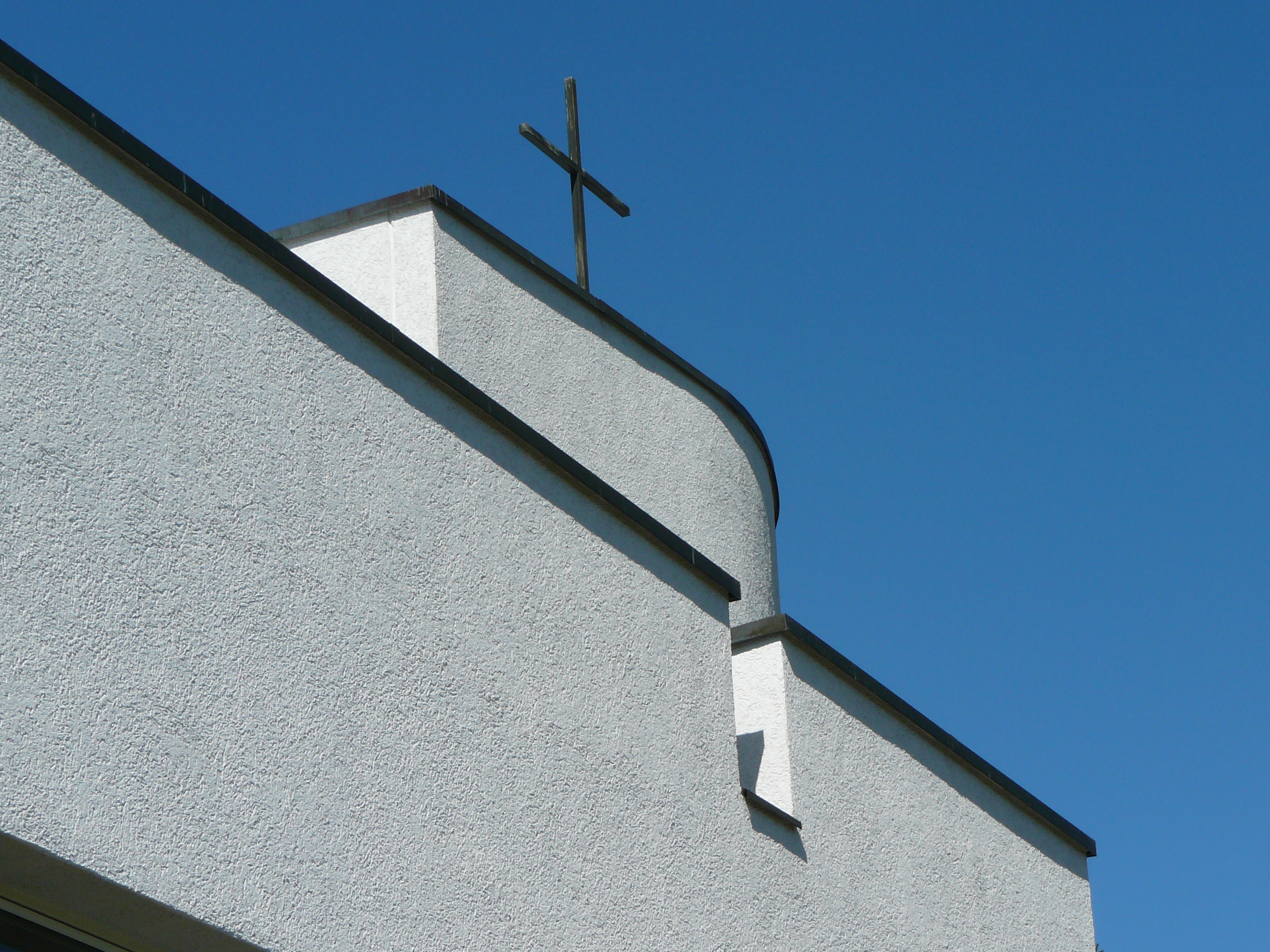 Römisch-katholische Pfarrkirche St. Petrus Rümlang, Dachkreuz